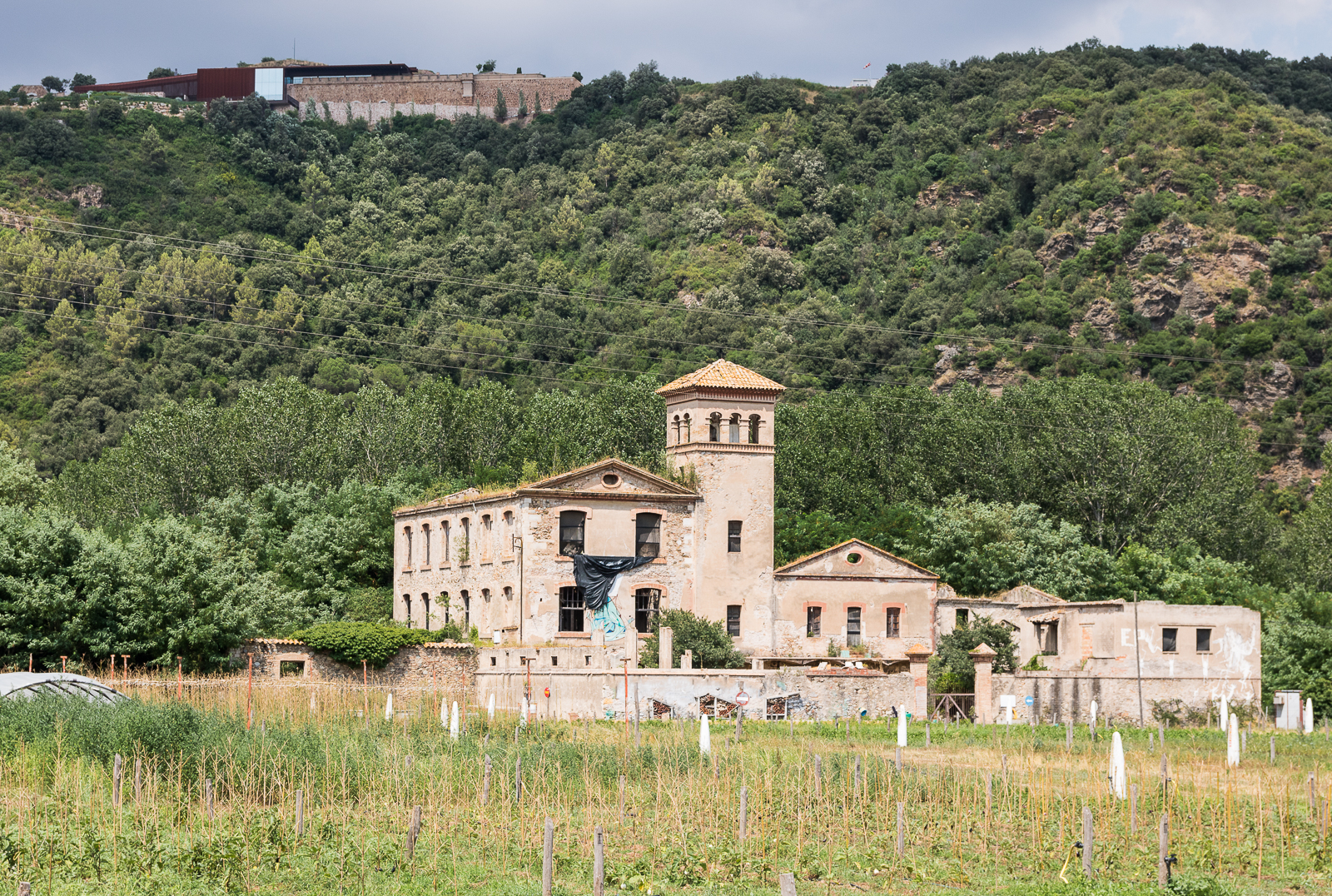 La harinera María de Campdorá, en el municipio de Gerona, estuvo operativa hasta 1912, aproximadamente. Situada al lado del río Ter. También se llamaba harinera d'en Vinyals